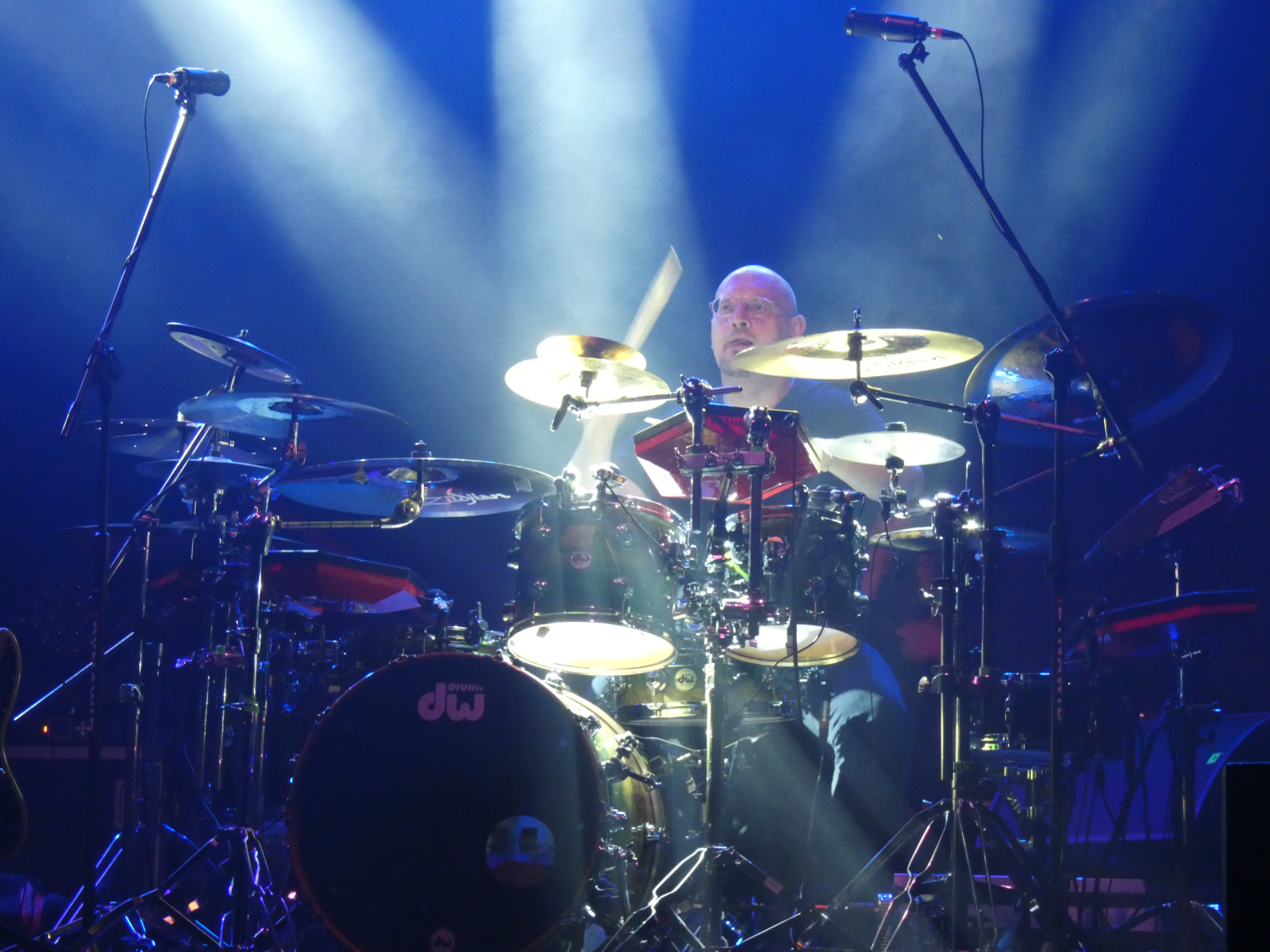 Tomasz Łosowski, Nowa Dęba 2019-06-16